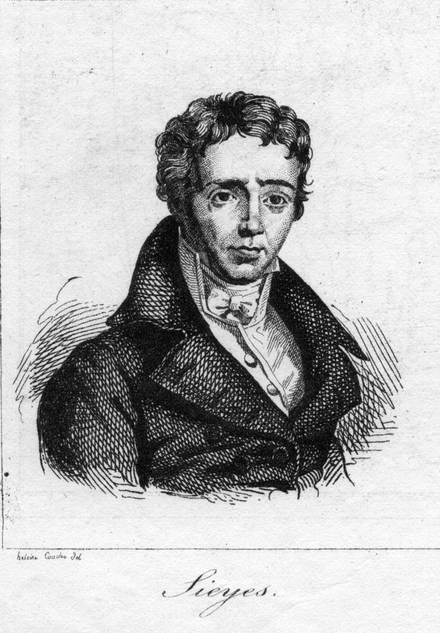 portrait gravé